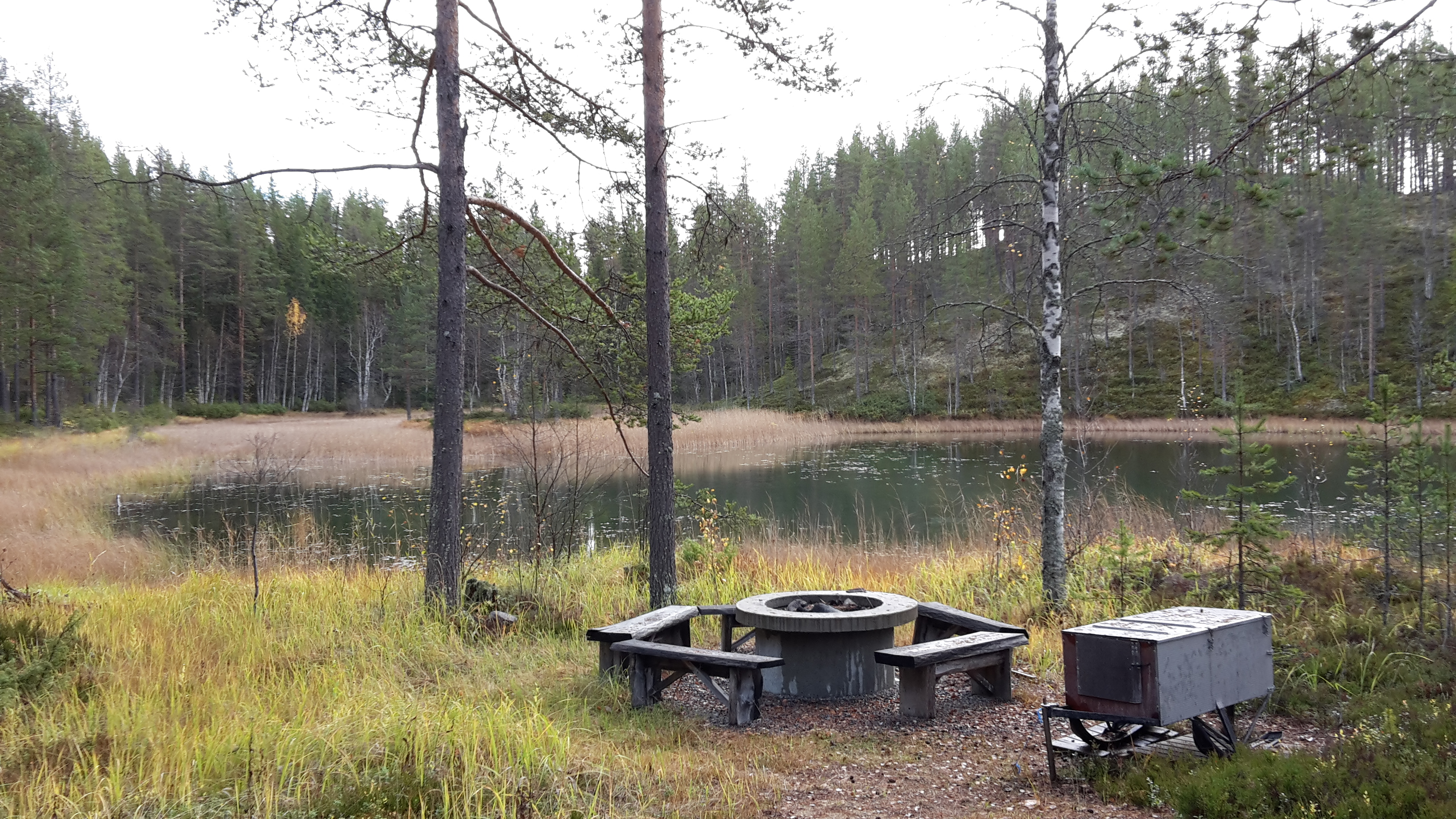 Gröntjärnen österut från stugan.